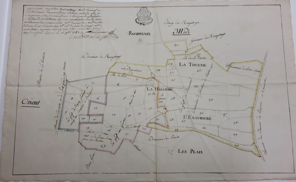 Plan des terres de la Hallière tracé par le notaire de Digny pour résoudre un litige.